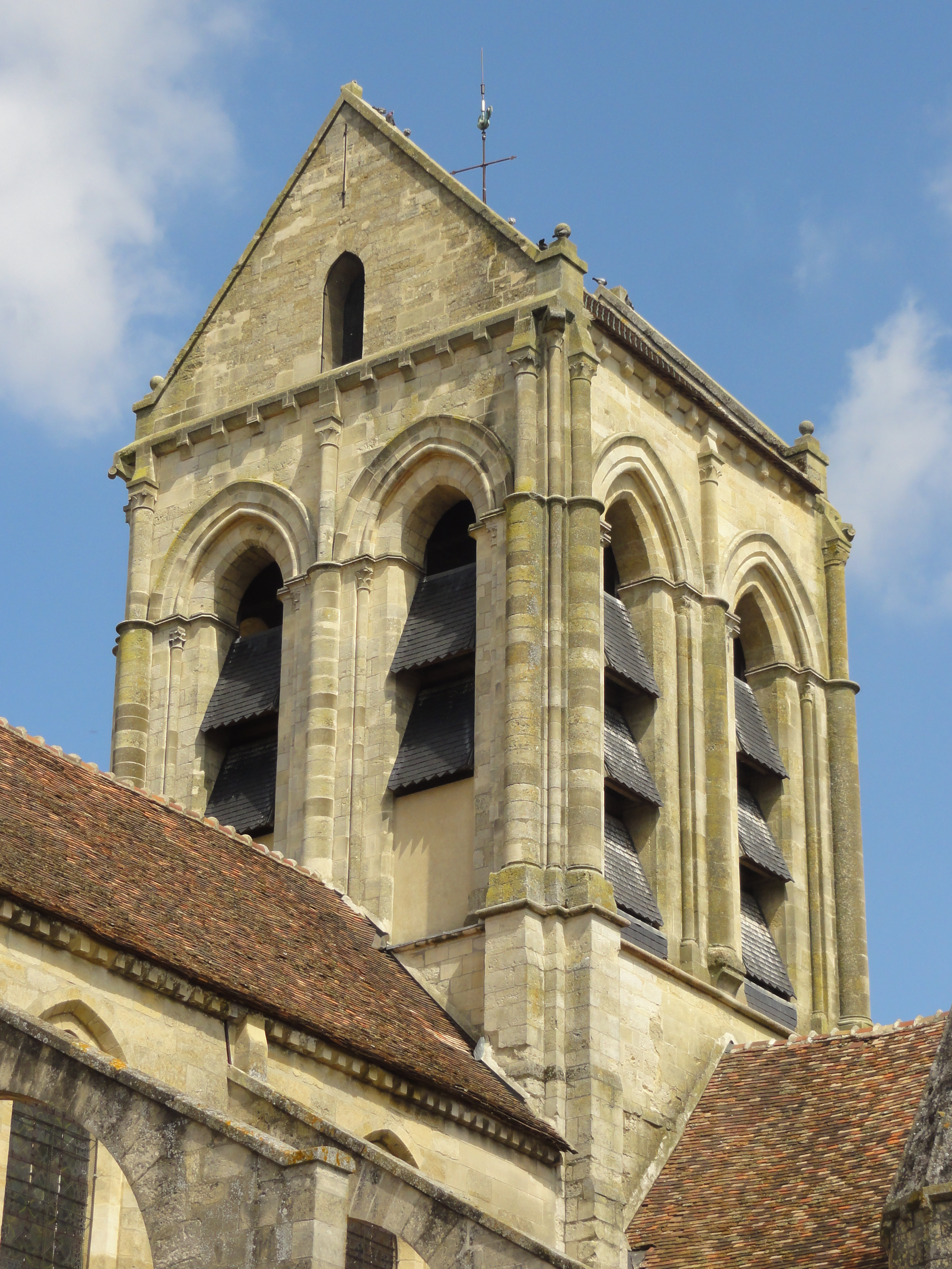 Église Notre-Dame-de-l'Assomption d'Auvers-sur-Oise - voir titre.